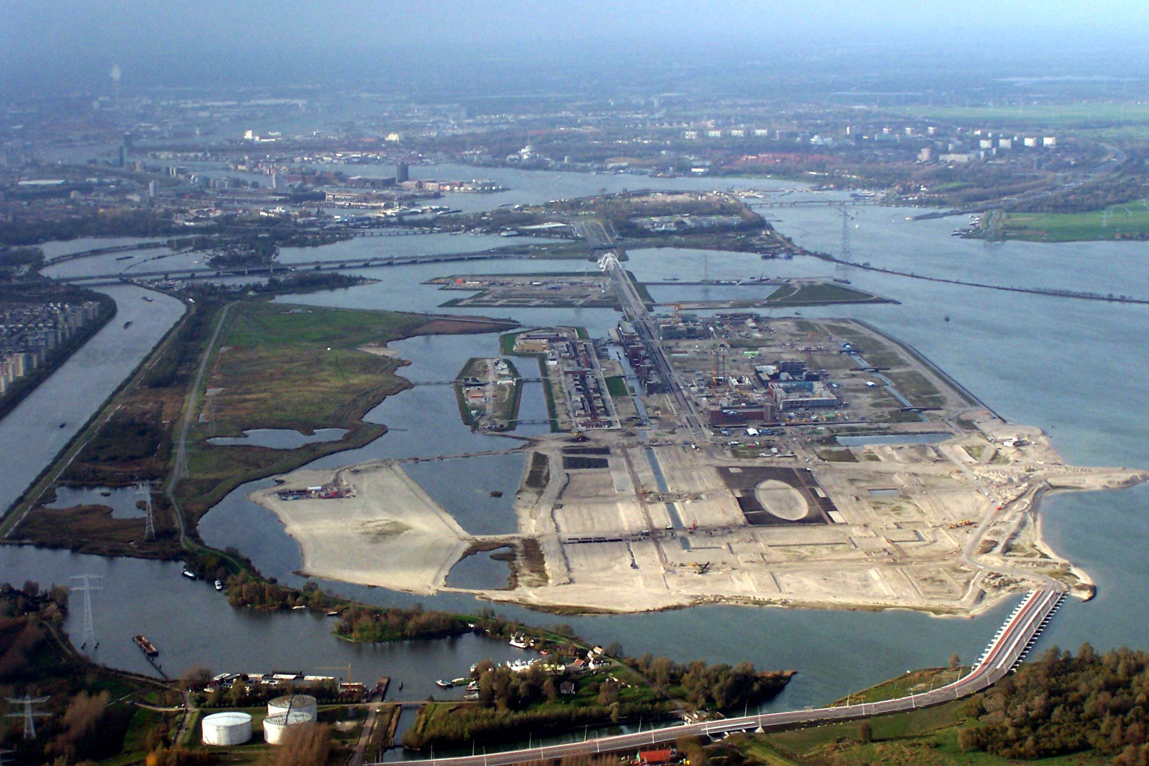 Ijburg